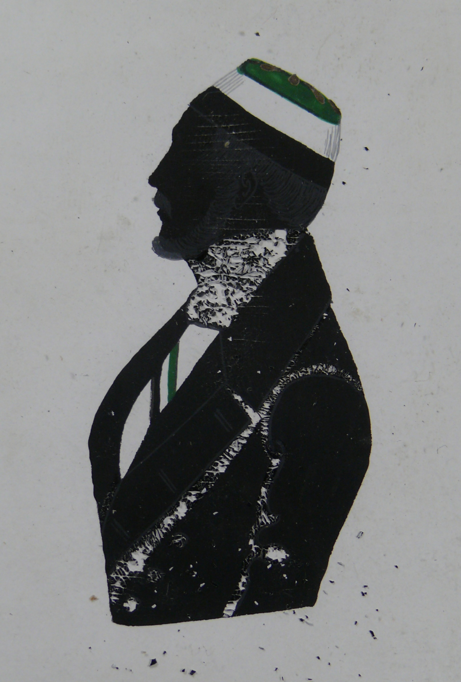 Silhouette von August Drechsler (1821-1897)